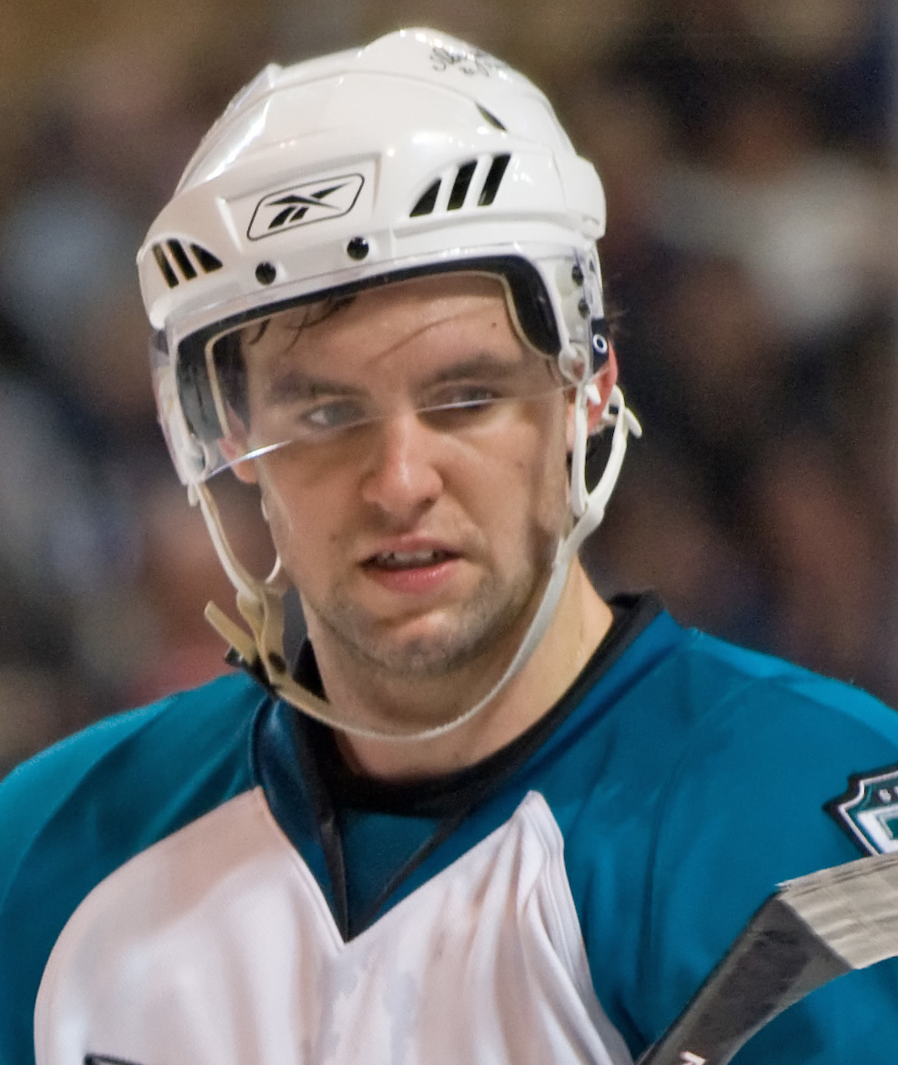 Tom Cavanagh